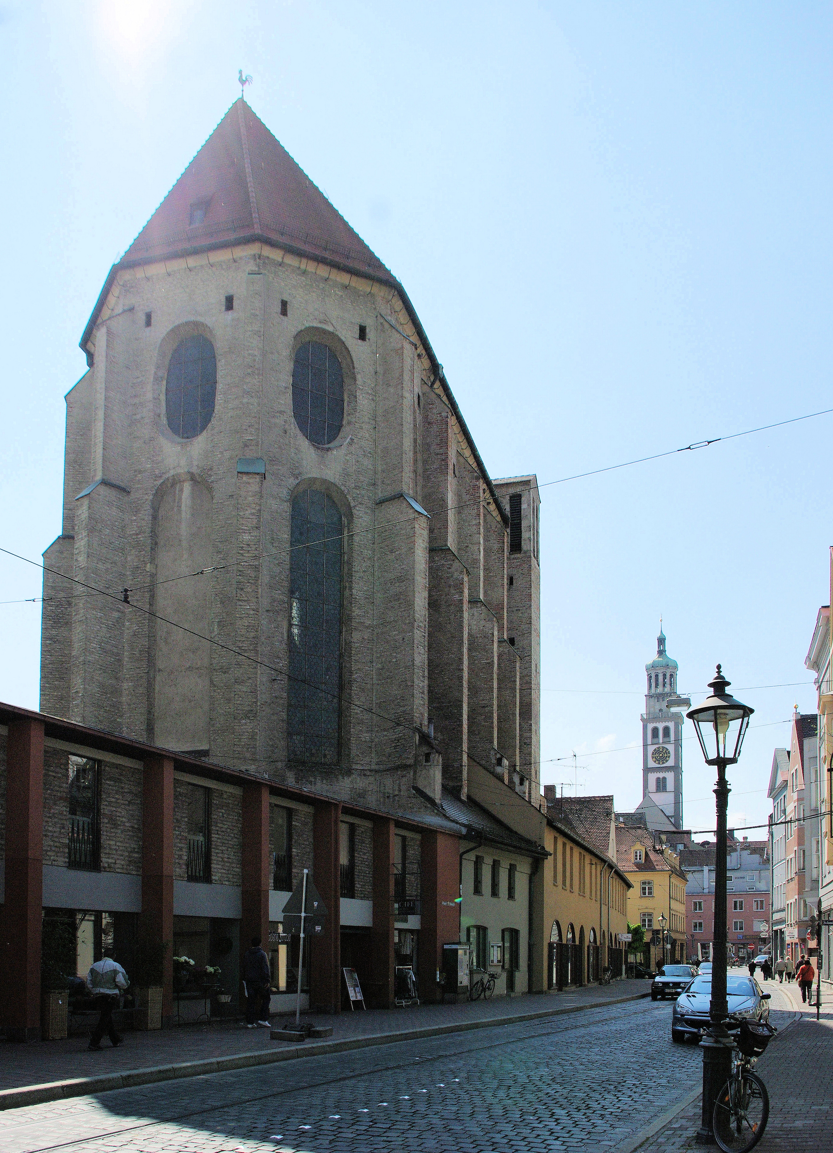 Bilder aus und von der Barfüßerkirche in Augsburg Barfüßerkirche mit Blick auf Perlach